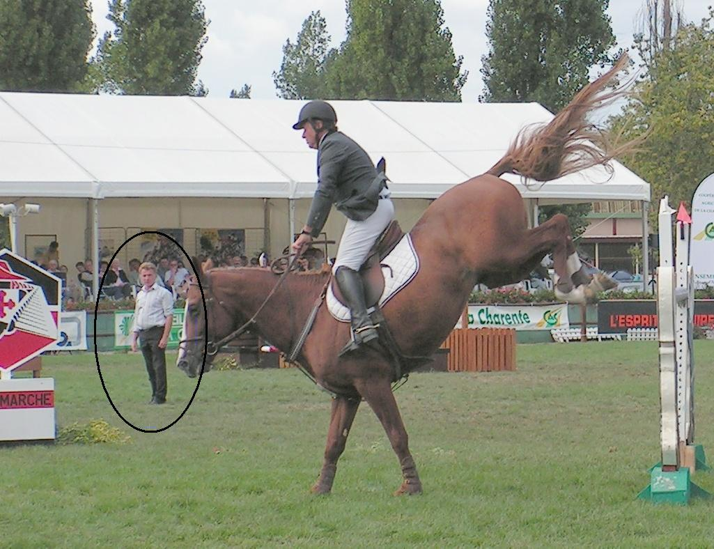 Le chef de piste Jean François Morand au CSI* de Chalais en 2006, évalue discrètement les défauts et les qualités de la piste qu'il a monté en observant les compétiteurs (ici Michel Cizeron sur Kantor de Logerie).